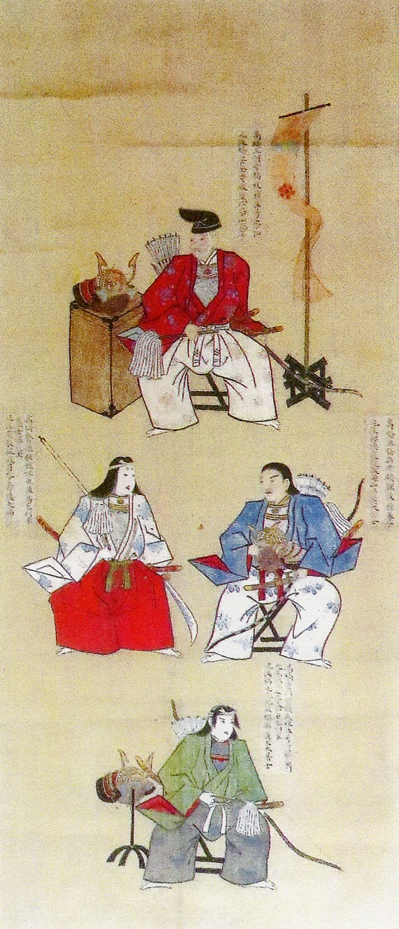 高橋鑑種一族肖像画。上段高橋鑑種、中段右高橋紹運、中段左力姫、下段元光。